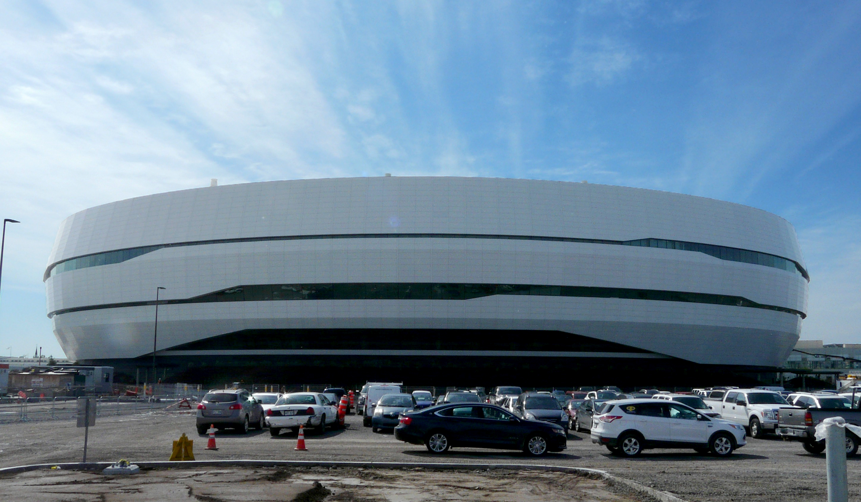 Centre Vidéotron en juin 2015.